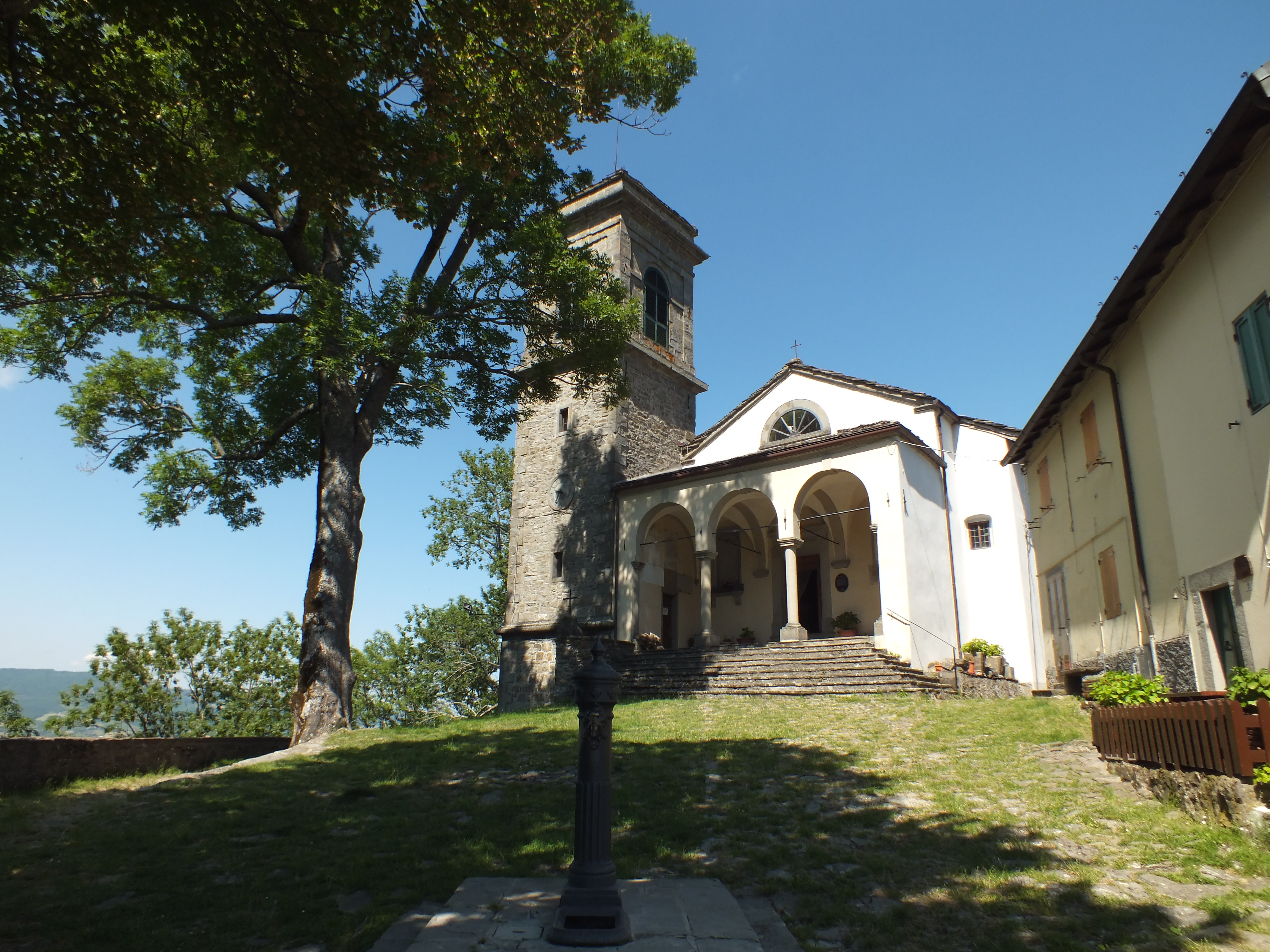 La chiesa dedicata a San Nicola